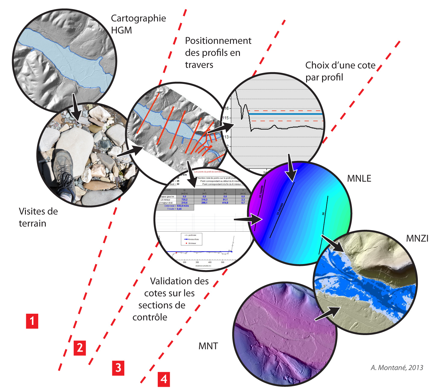 Issu de la thèse "L'approche hydrogéomorphologique : pratiques, valorisations et développement d'une méthode de cartographie des zones inondables"